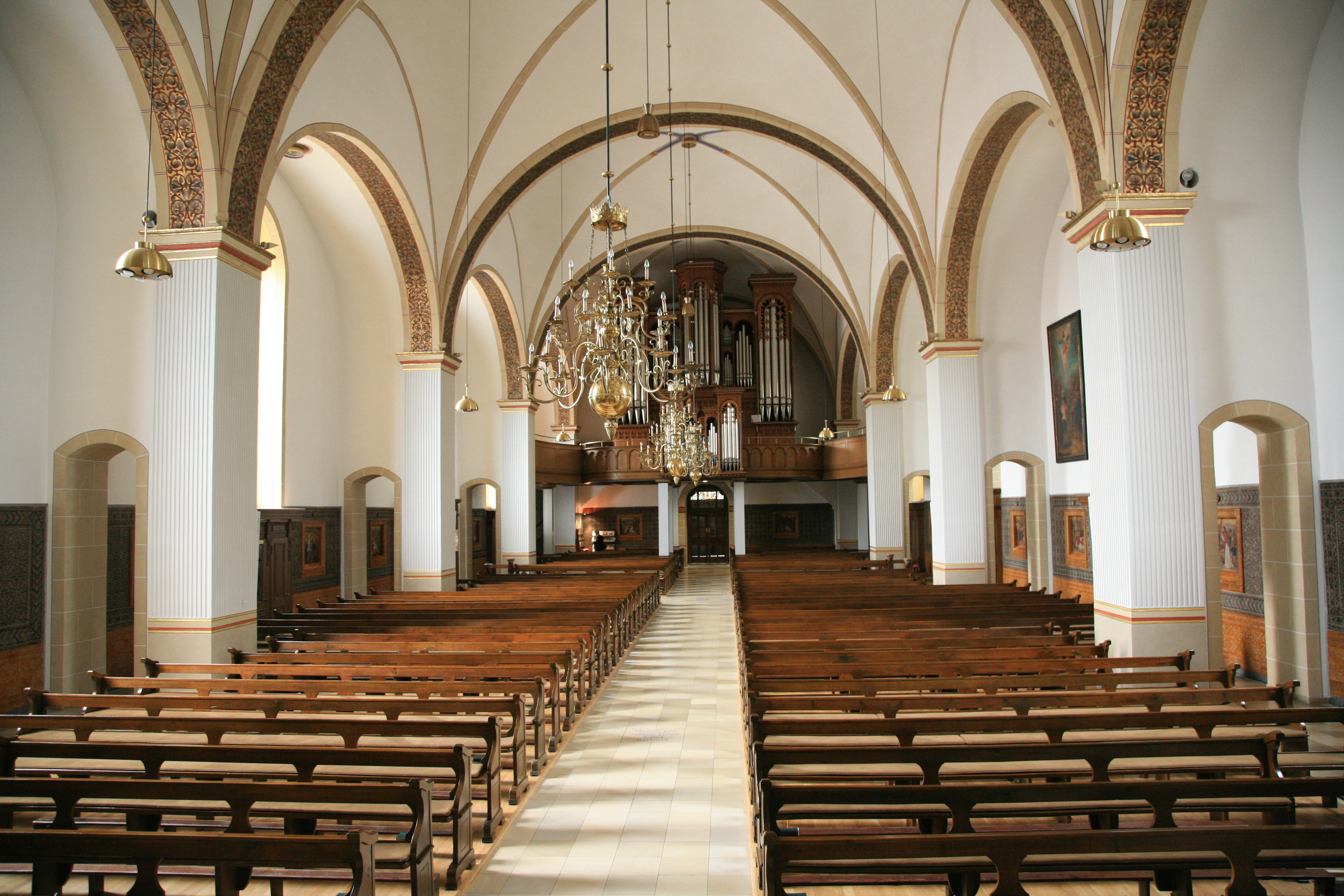 St. Gertrud Kirche is a church in Lohne (Oldenburg)